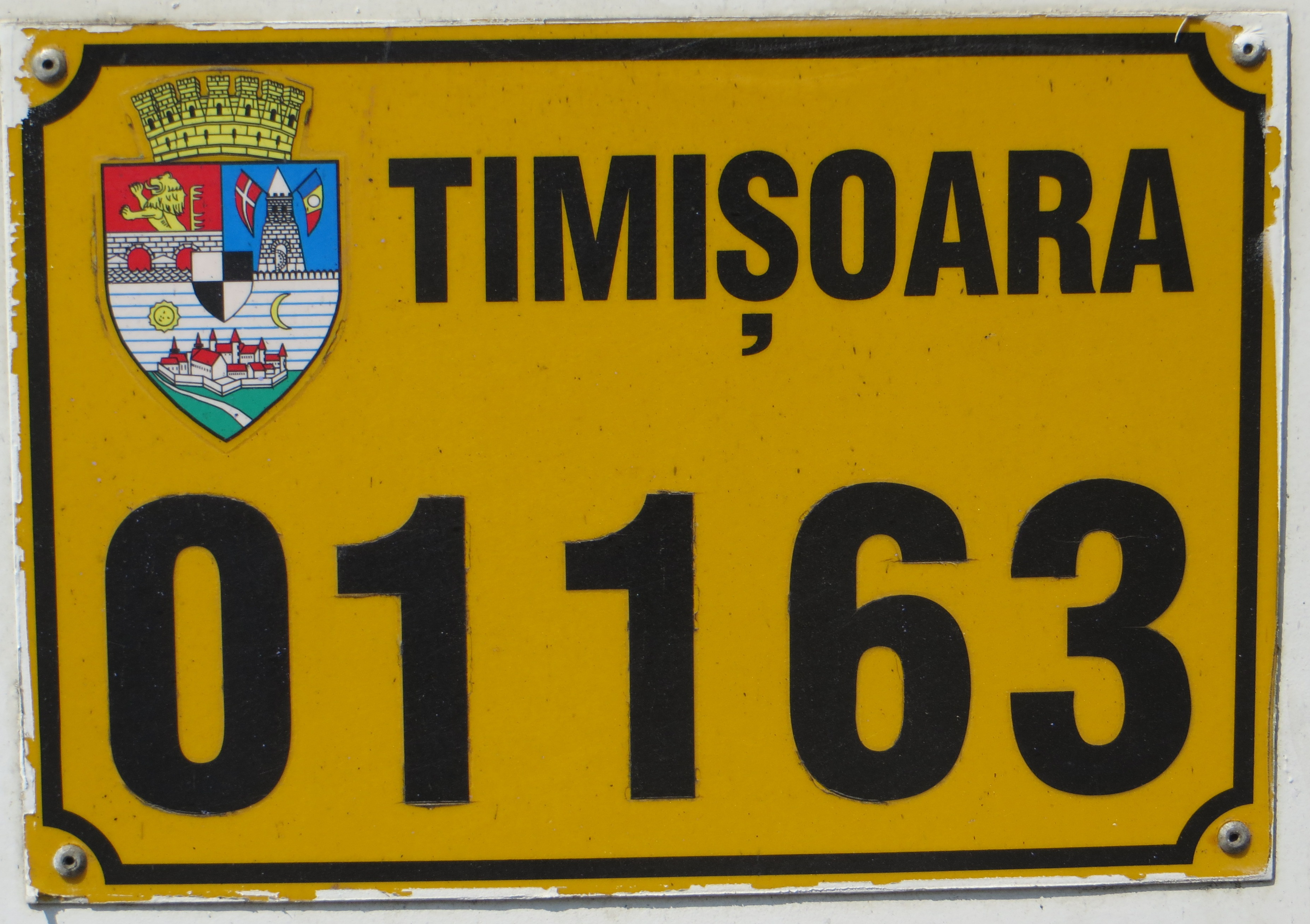 kentekenplaat uit Roemenië - Timișoara